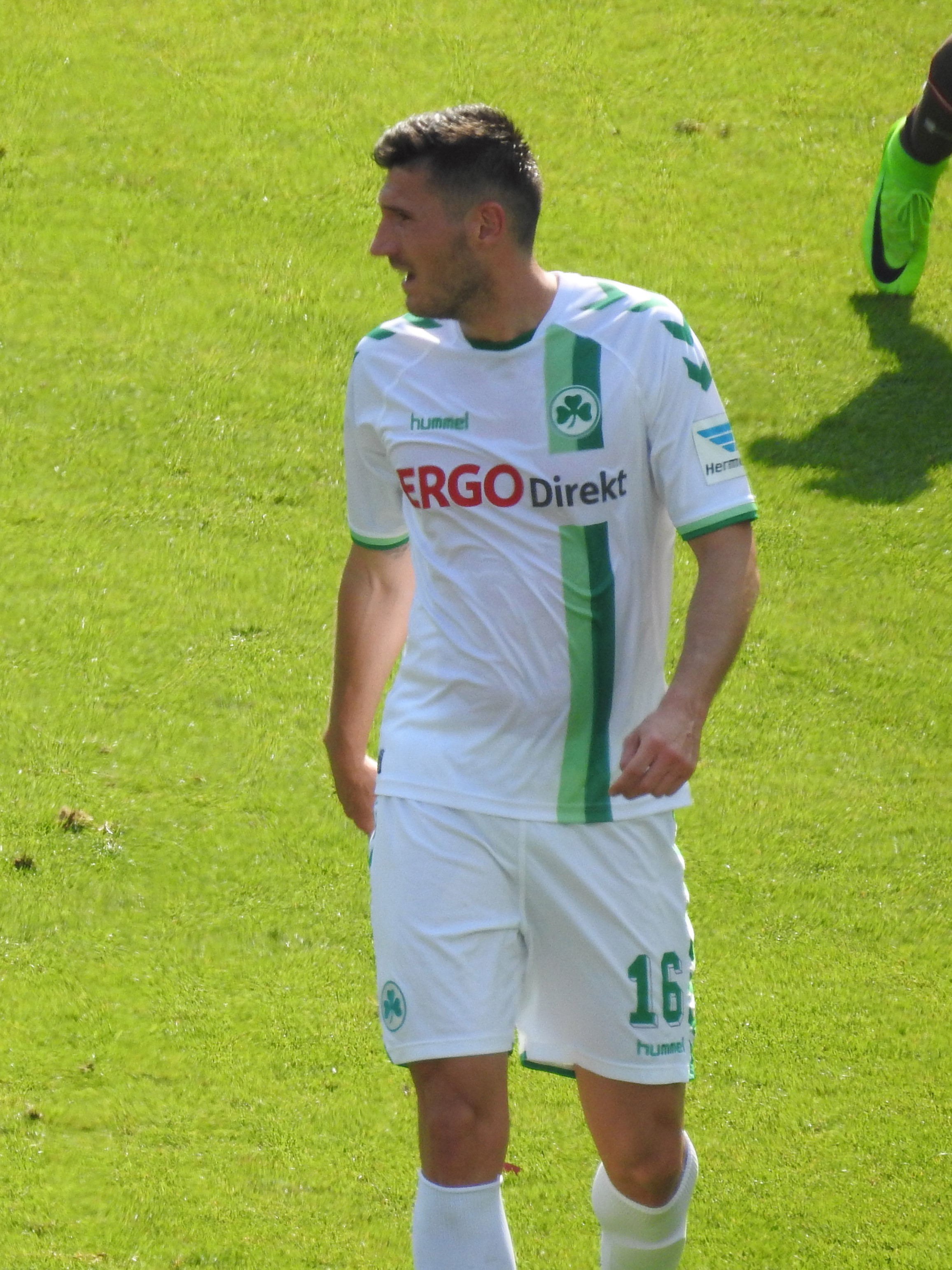 Adam Pinter SpVgg Greuther Fürth